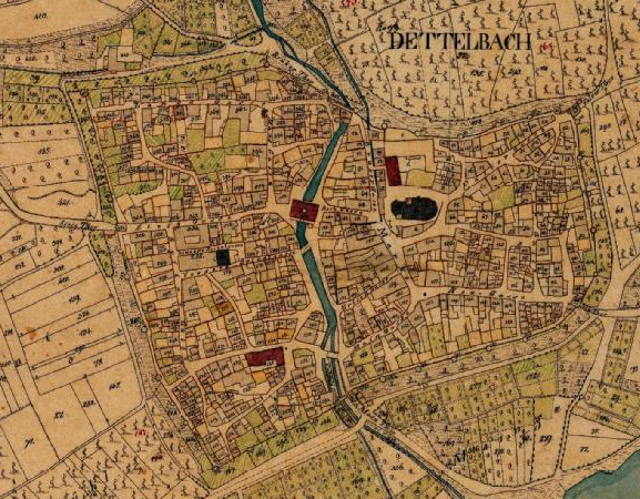 Kartenausschnitt Urkataster Bayern, Altstadt Dettelbach, 1832